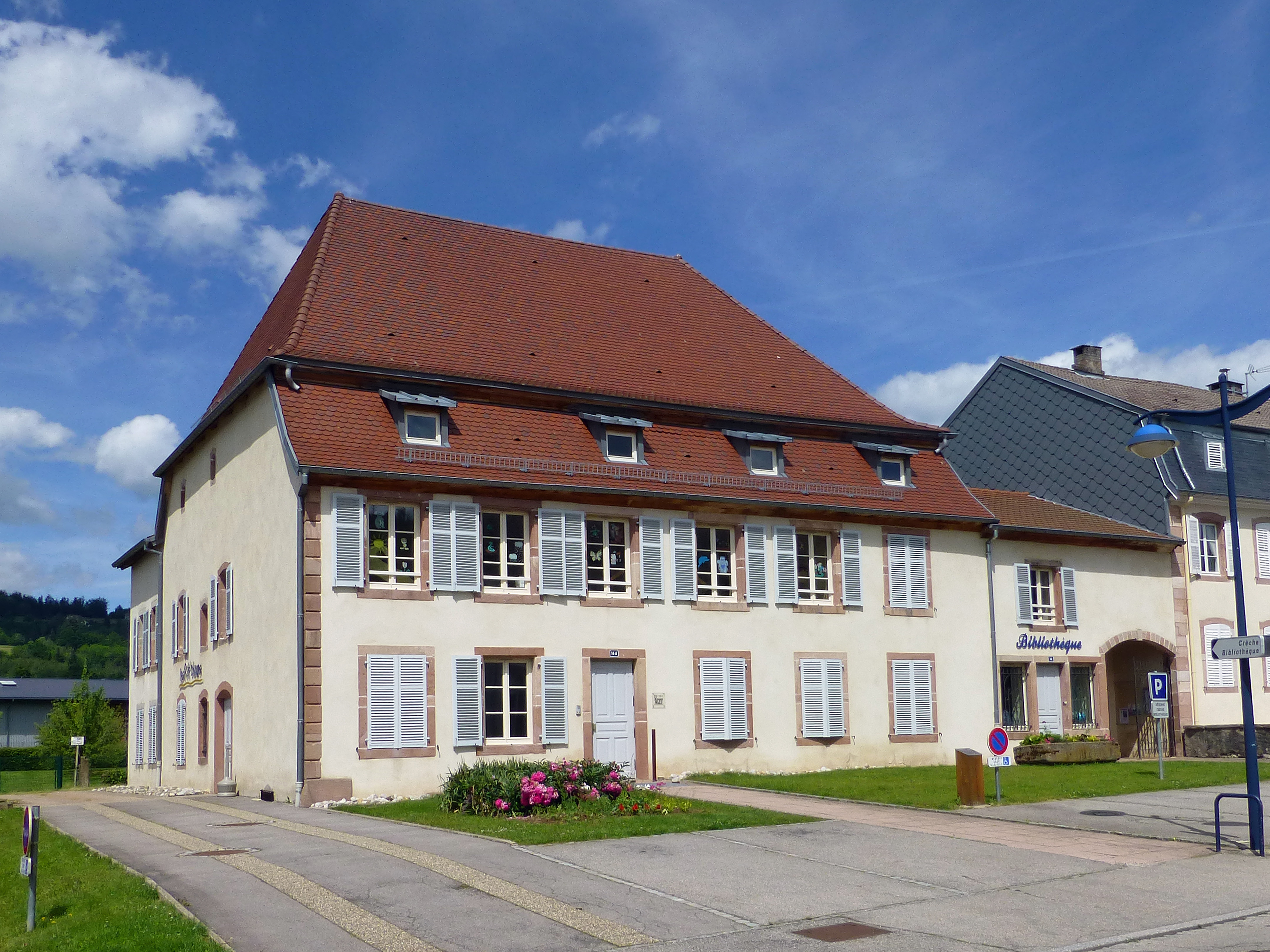 Fraize (Vosges) : Maison Masson-Wald, inscrite MH